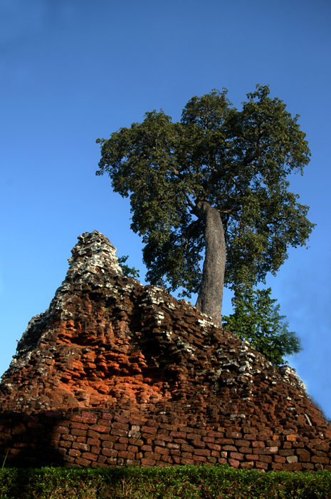 Candi Lor at Nganjuk, East Java, Indonesia